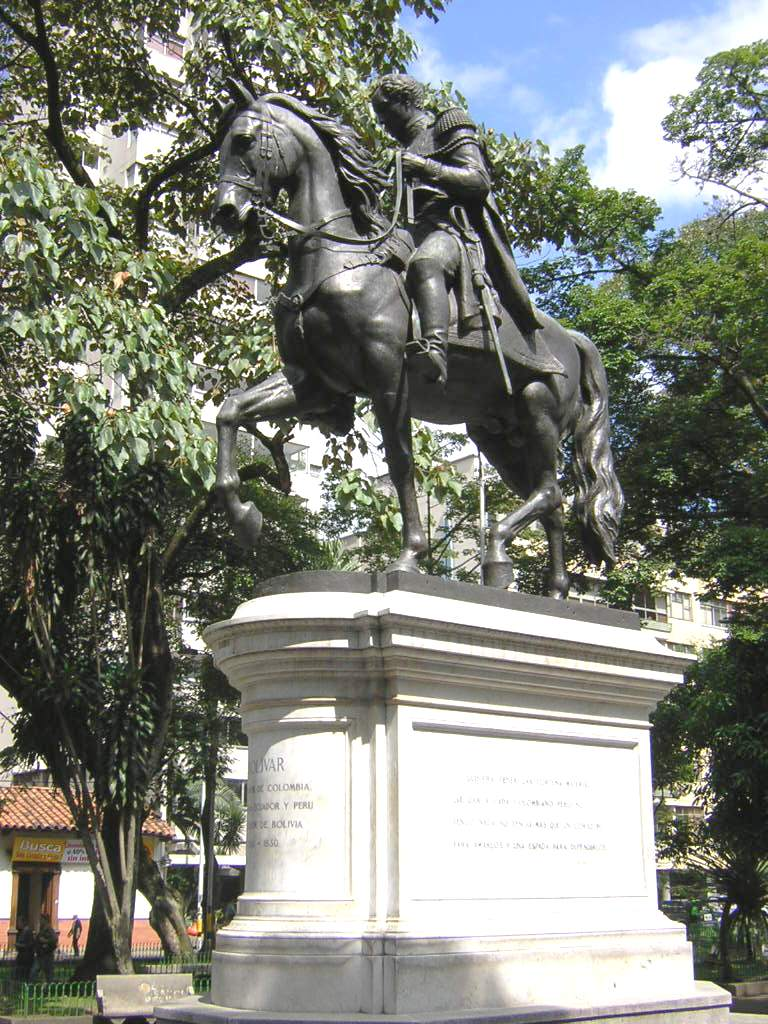 Estatua ecuestre de Simón Bolívar obra del italiano Eugenio Maccagnani, ubicada en Parque Bolívar, Medellín, Colombia